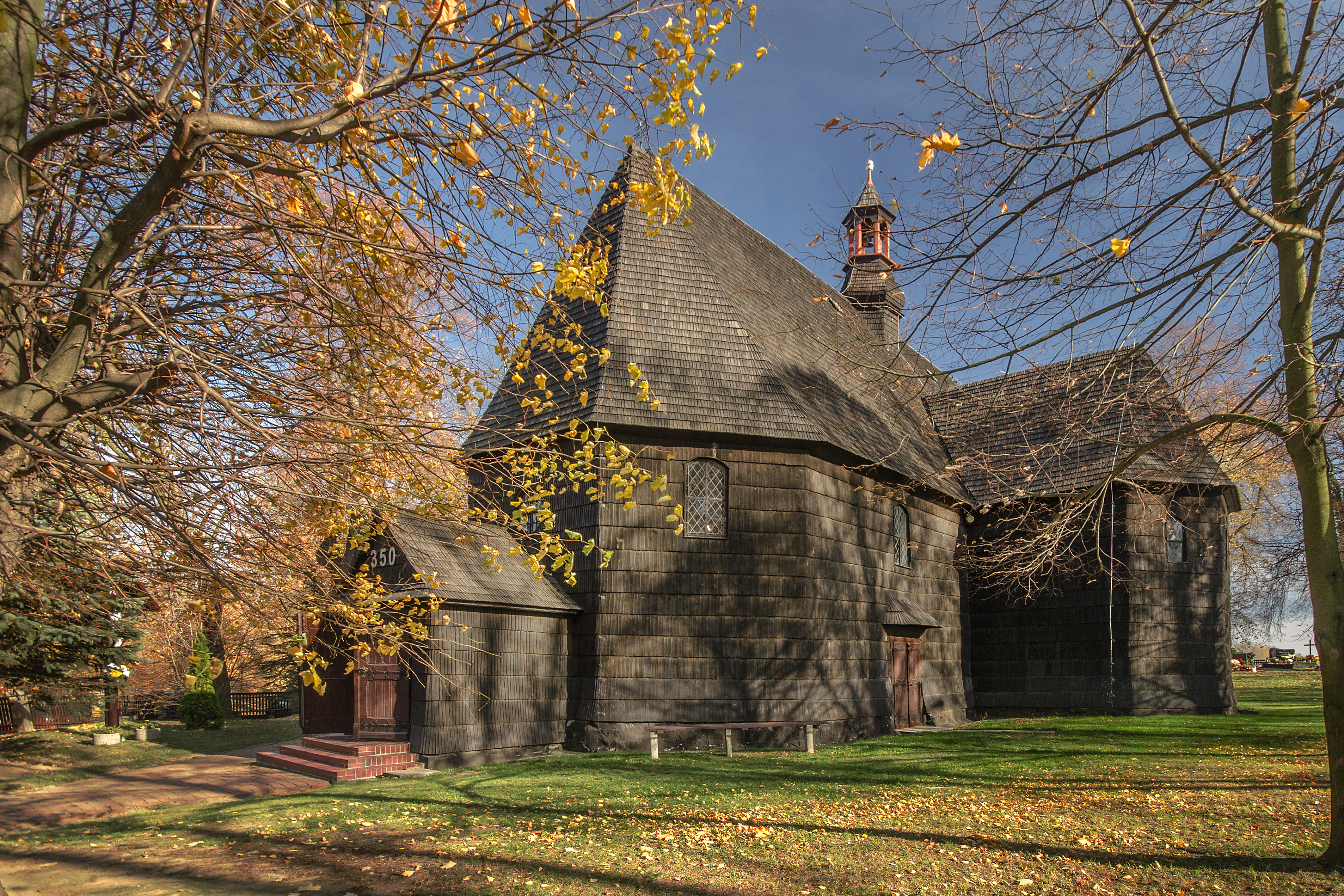 Gościęcin, kościół odpustowy pw. św. Brykcjusza, 1661